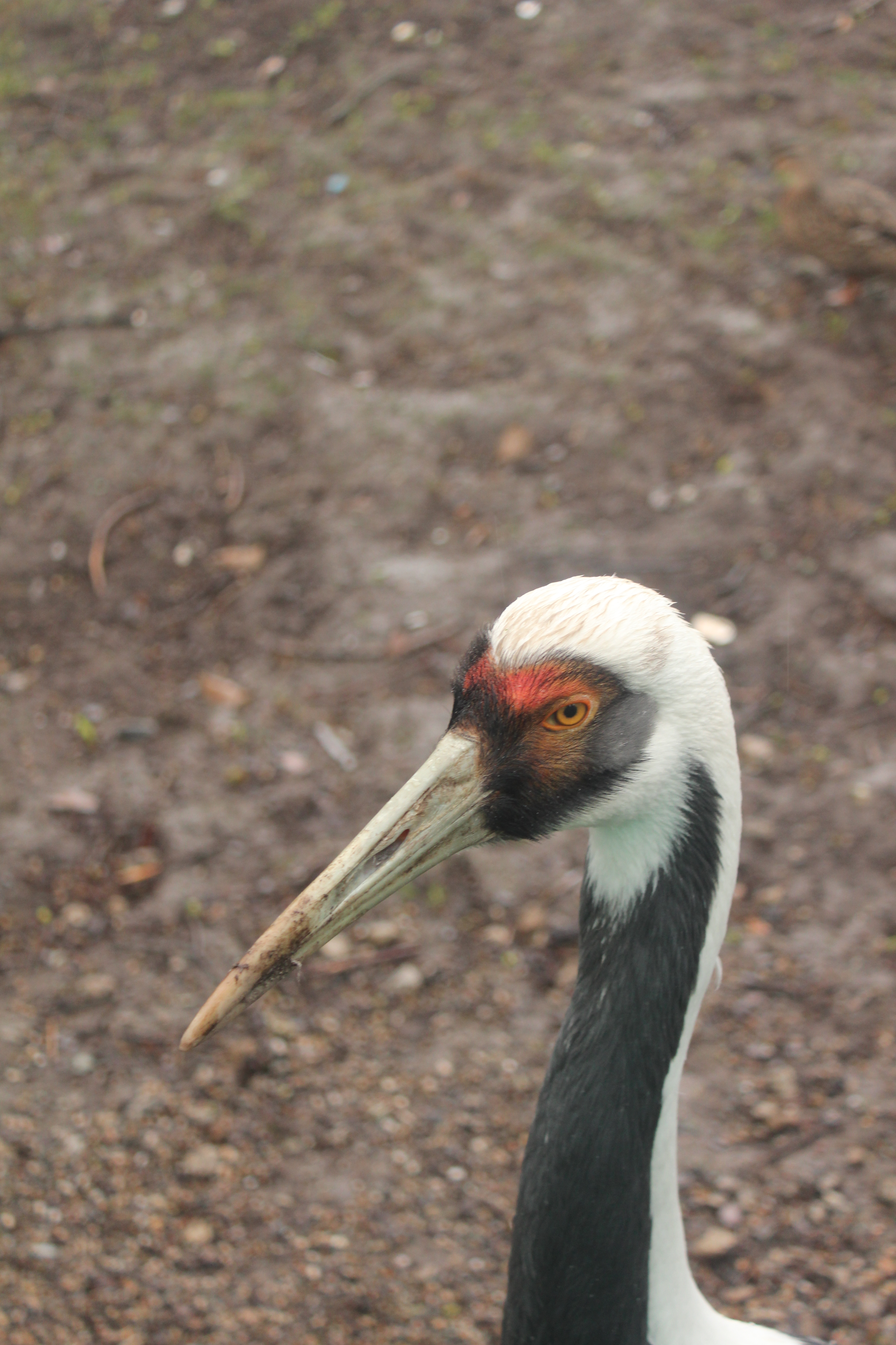 Weißnackenkrankich (Kopf)